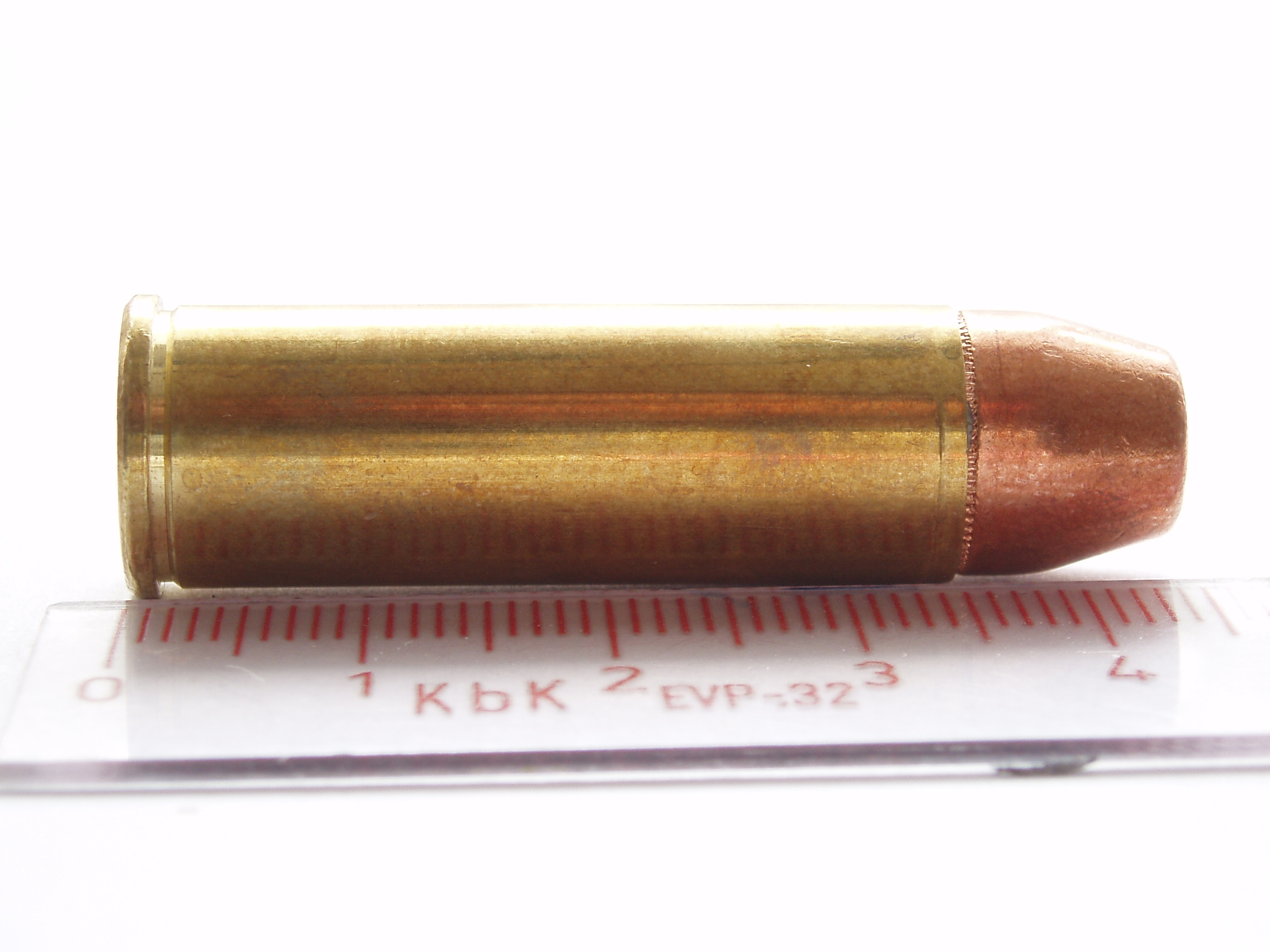 .454 Casull revolver cartrdige.FMJ bullet.